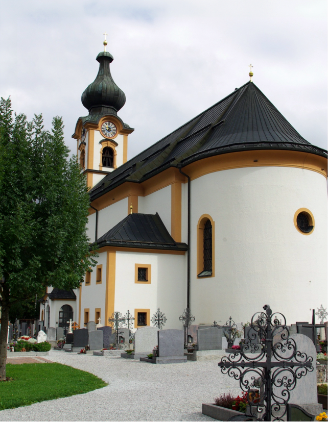 Kath. Pfarrkirche hl. Leonhard